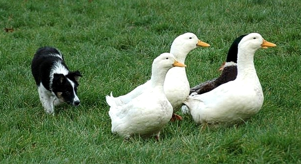 Border Collie (View Dan) 9 semaines, apprentissage sur canards